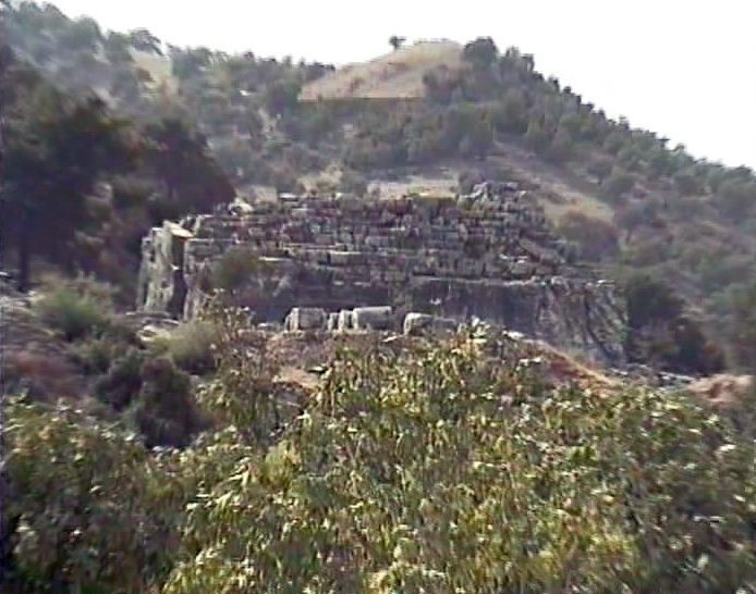 Mausoleum von Belevi, bei Selçuk, Westtürkei